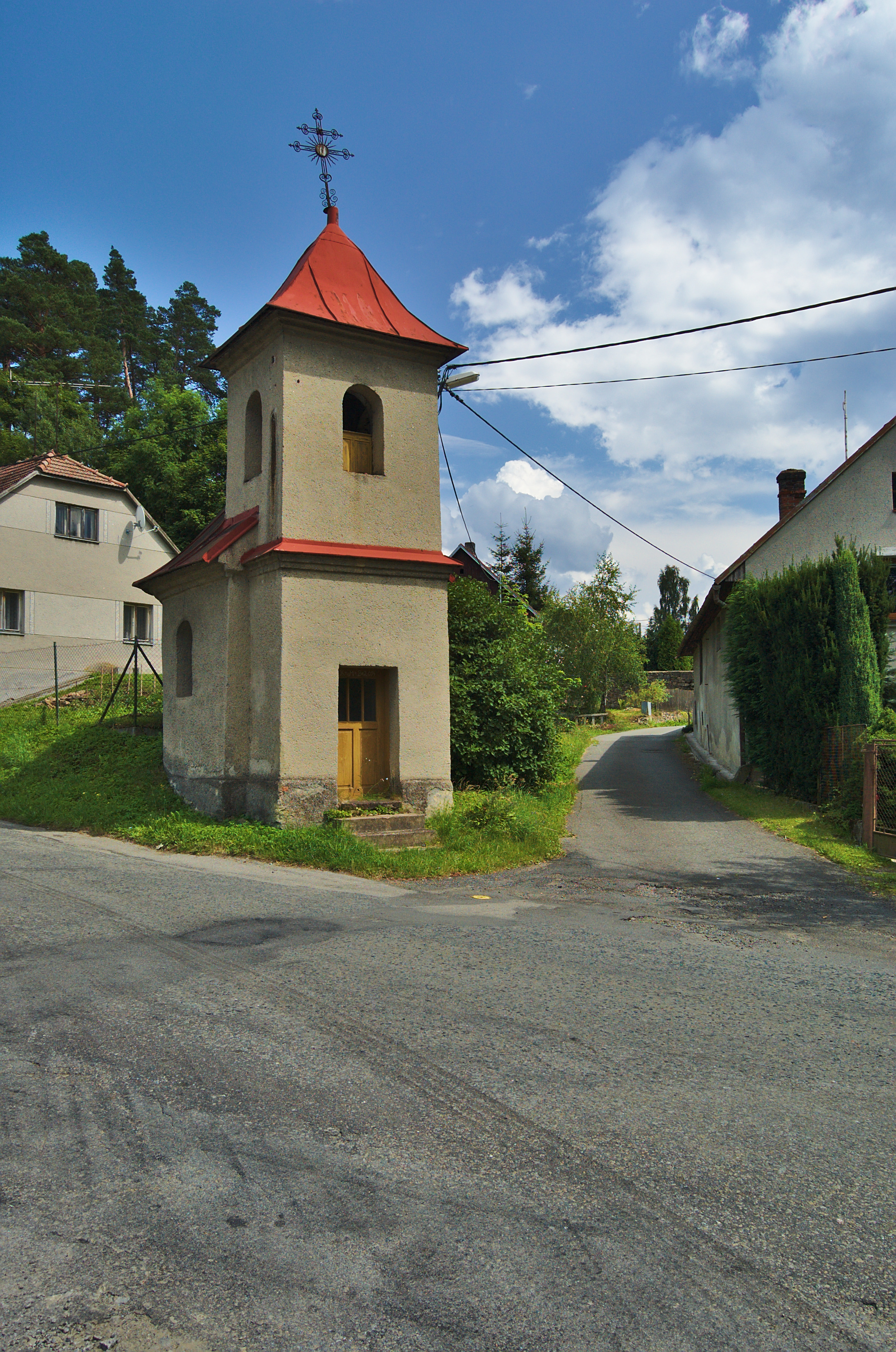 Kaple, Nové Sady, Horní Štěpánov, okres Prostějov